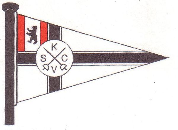 Flag (Stander) of the Wassersportliche Vereinigung Alter Corpsstudenten (WVAC), Berlin